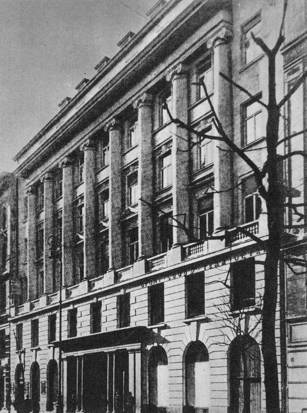 "Adria" przy ul. Moniuszki 10 w Warszawie